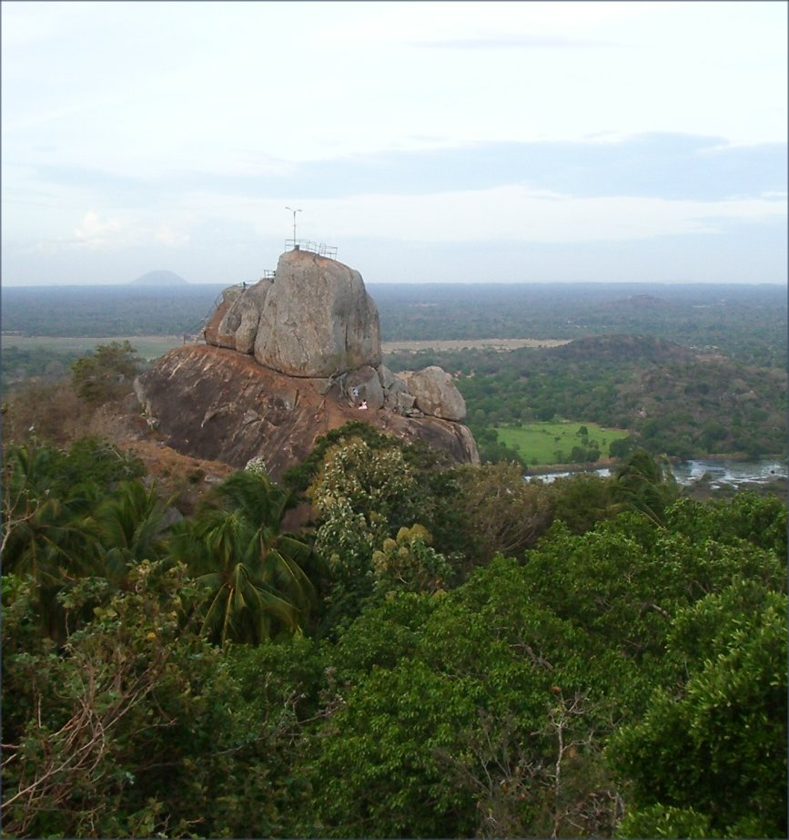 vista des el temple de Mihintale, foto feta per J. Ollé el juliol del 2006